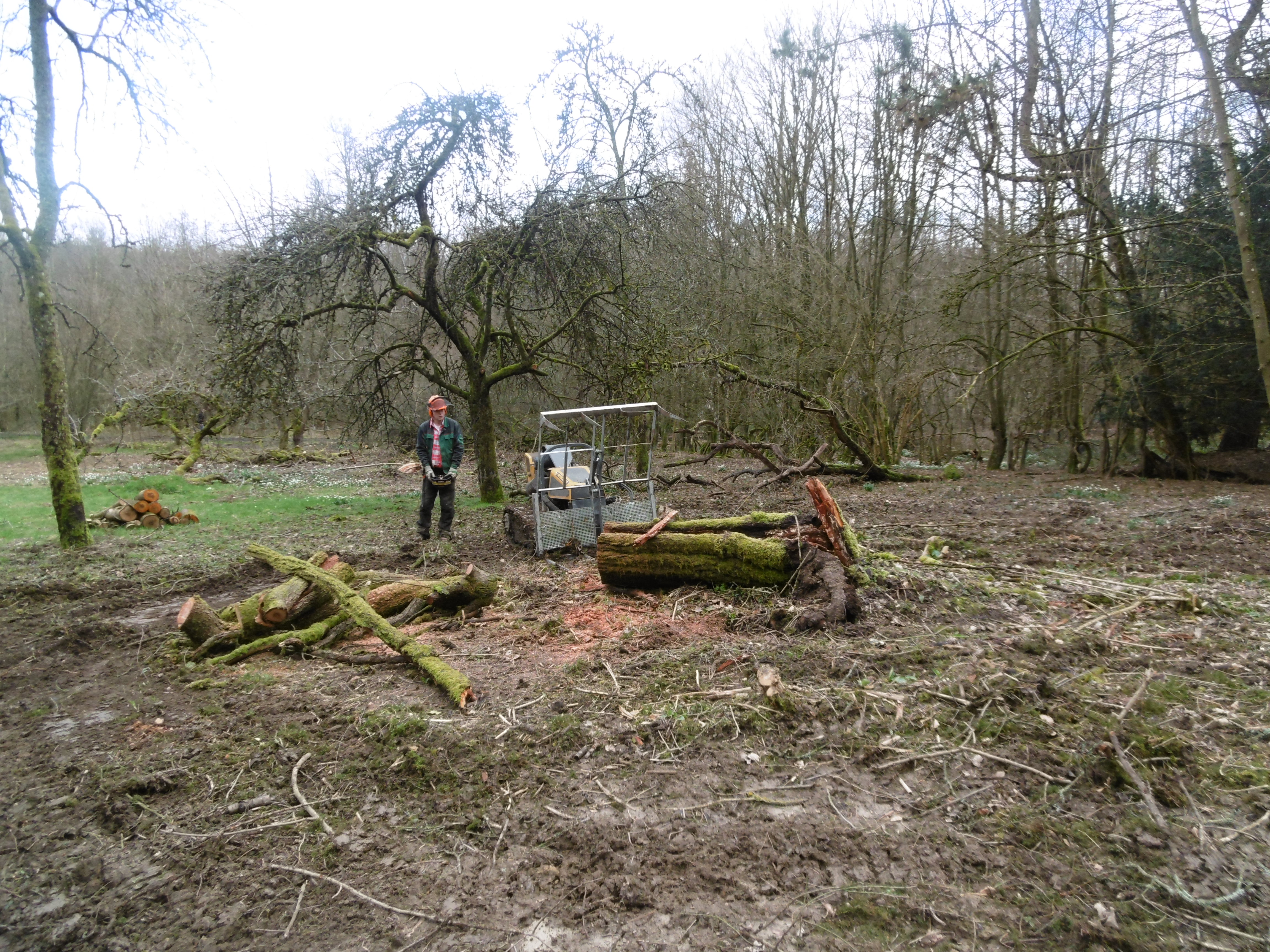 Robocut der Biologischen Station HSK bei Arbeit auf Obstwiese am Standort des Forsthauses im Naturschutzgebiet Spreiberg. Robocut räumt umgefallene Obstbäume von der vorher entbuschten Obstwiese.